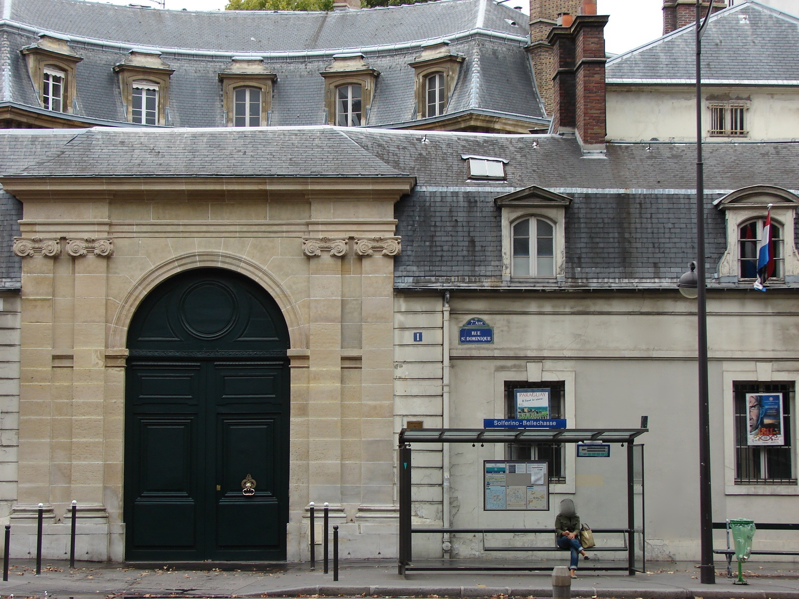 Hôtel de Gournay - 1 Rue Saint-Dominique - Paris 7 Vue générale de la façade sur la rue Saint-Dominique. .